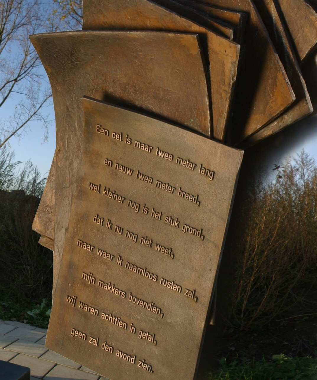 Monument voor Jan Campert, Jan Campertkade, Spijkenisse Helen Ferdinand, 2002 The factual accuracy of this description or the file name is disputed.Reason: Seems not a picture of the Jan Campertkade, but an image composition of two pictures: one of the book part of the monument, and one of nature